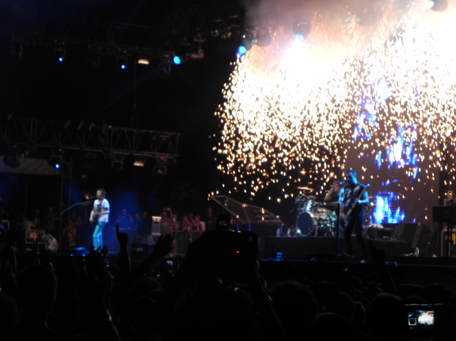 Muse Coachella 2010